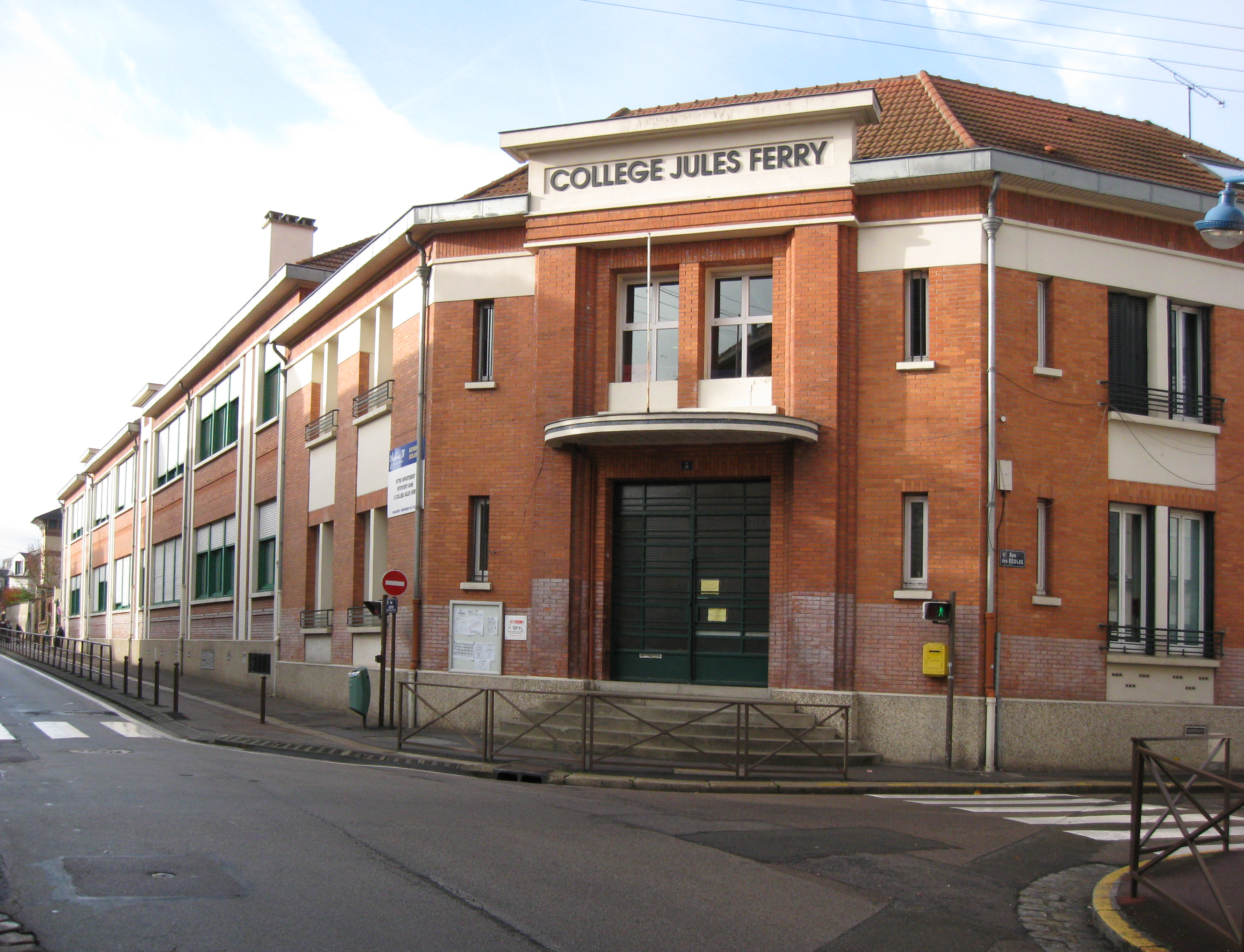 Collège Jules Ferry, Mantes-la-Jolie